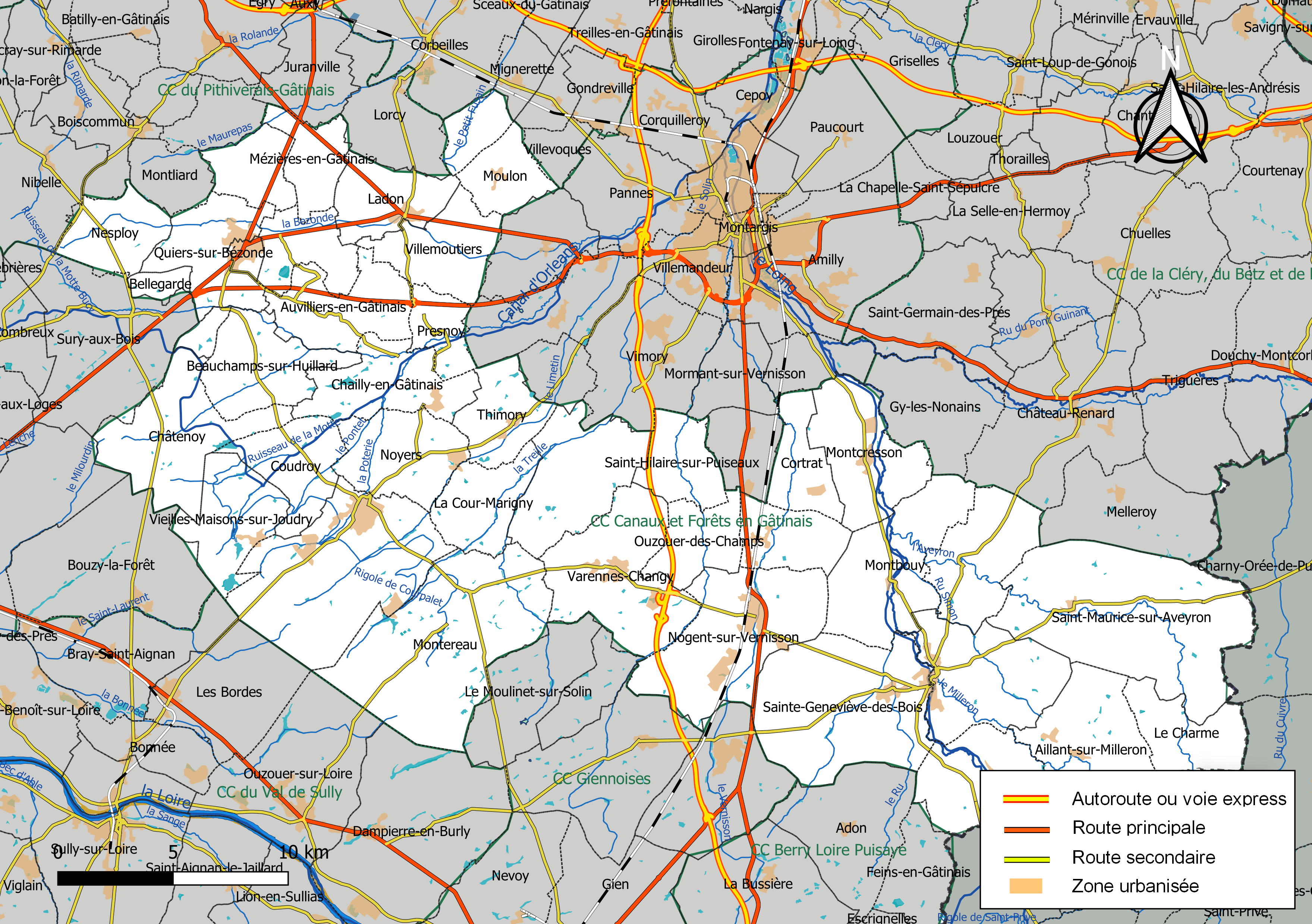 Carte géographique de la communauté de communes Canaux et Forêts en Gâtinais, département du Loiret, France. Composition au 1er janvier 2019.